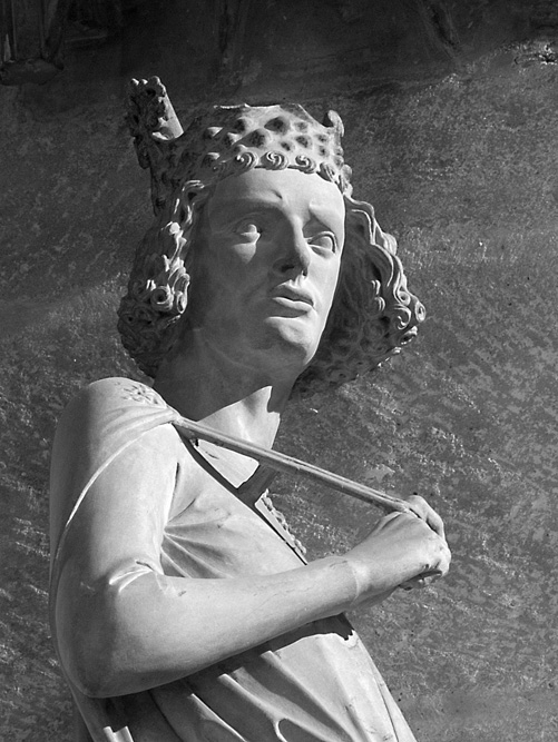 Der Bamberger Reiter (Detail)